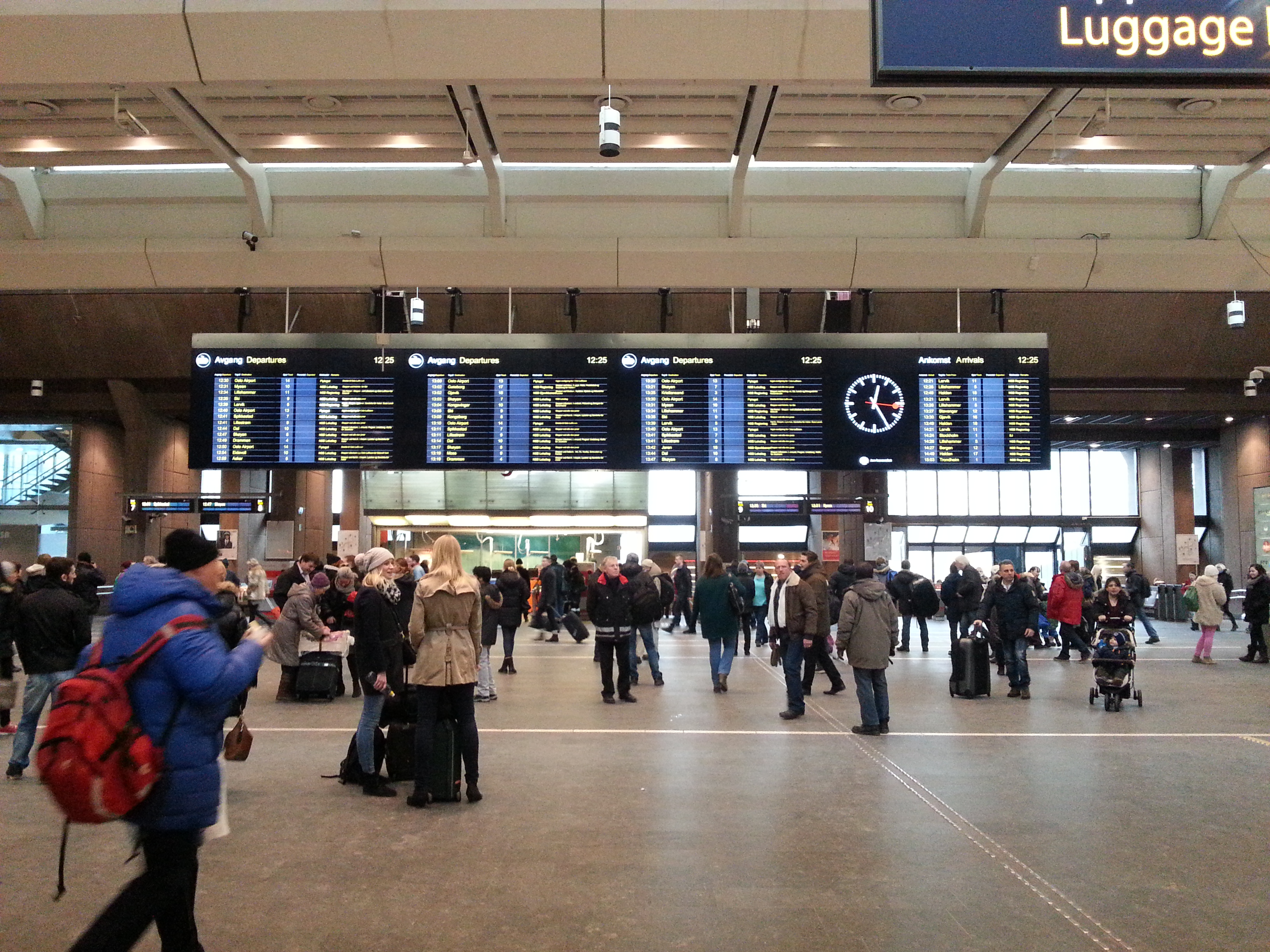 Oslo Sentralstasjon med den nye tavlen.